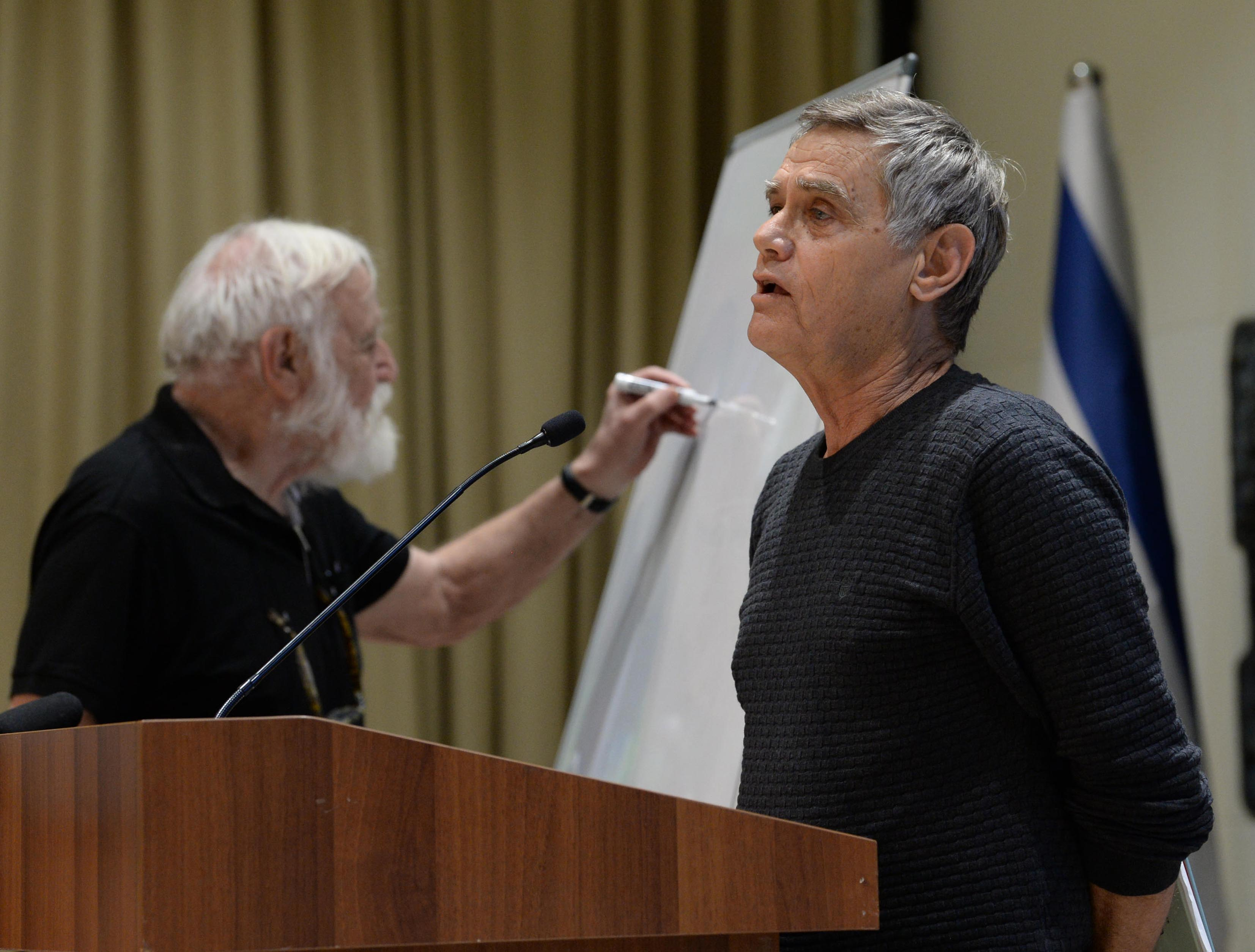 לקראת חג הפסח וברוח "והגדת לבנך" אירחו נשיא מדינת ישראל ראובן ריבלין ורעייתו נחמה ריבלין סבים וסבתות ונכדיהם לחוג תנ"ך חגיגי וייחודי במסגרת מיזם 929 בתמונה מימין אפרים סידון משמאל דני קרמן